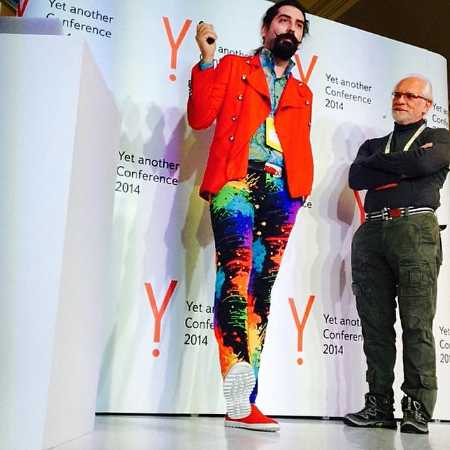 Выход Яндекс.Браузера под Линукс на YaC-2014